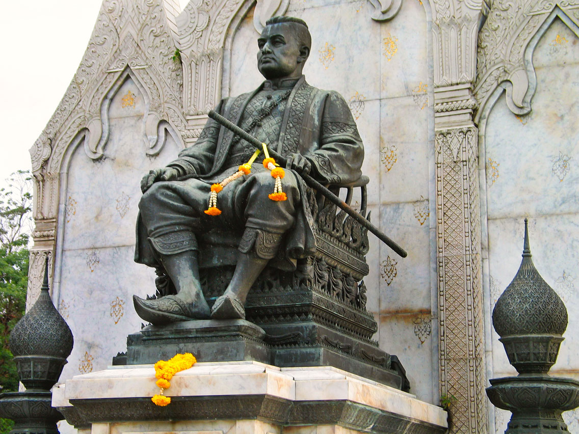 Statue of King Nangklao (Rama III.) near Wat Ratchanadda, Bangkok, Thailand.